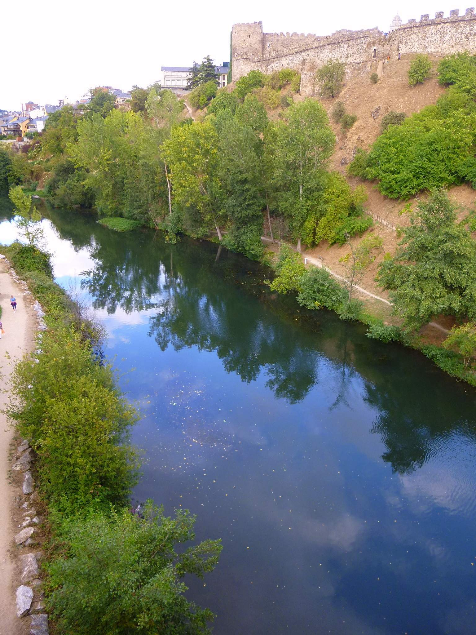 Ponferrada - Río Sil